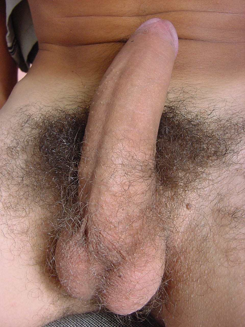 Pénis erecto